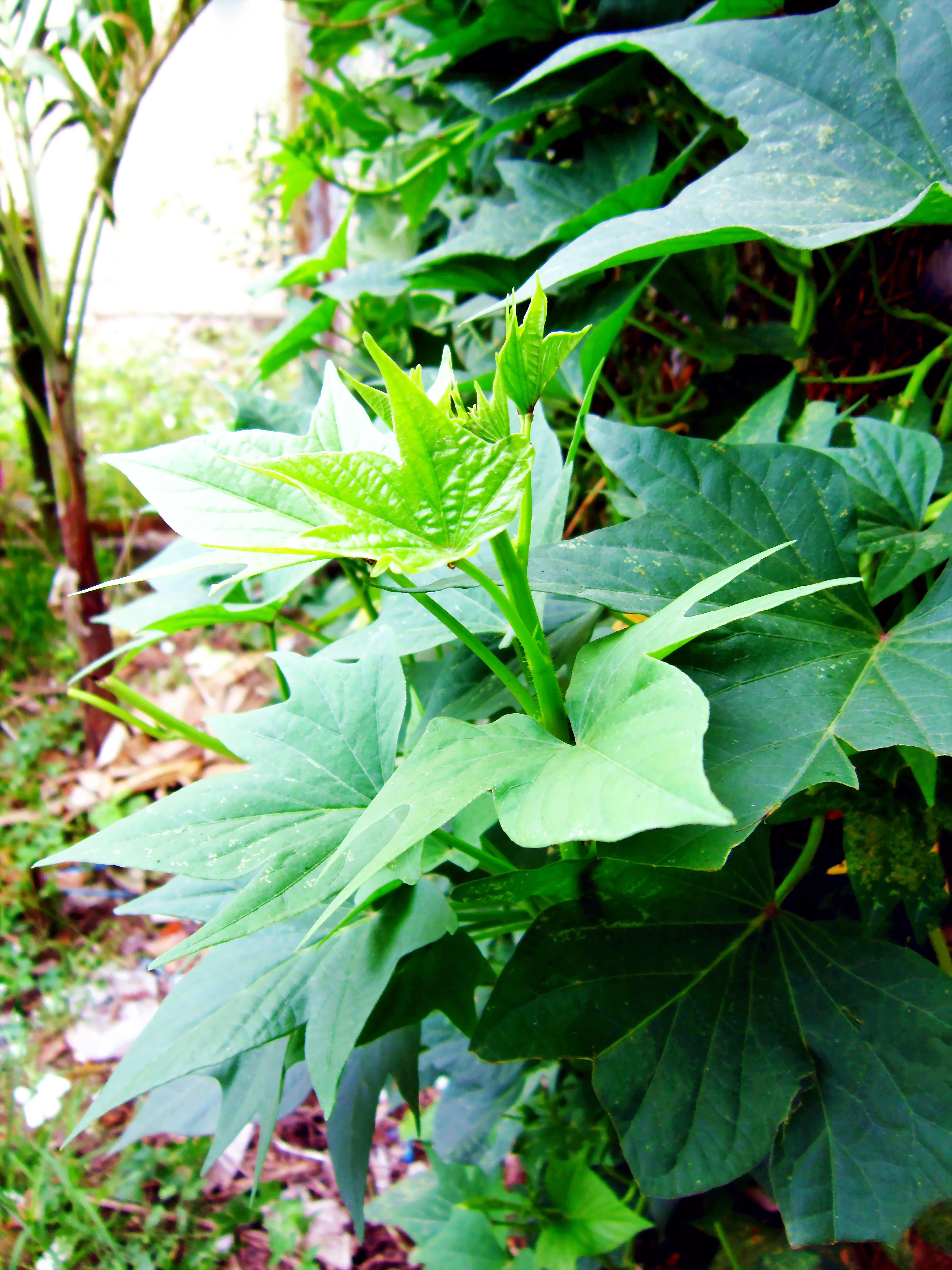 Đọt khoai lang, thường luộc làm rau ăn.